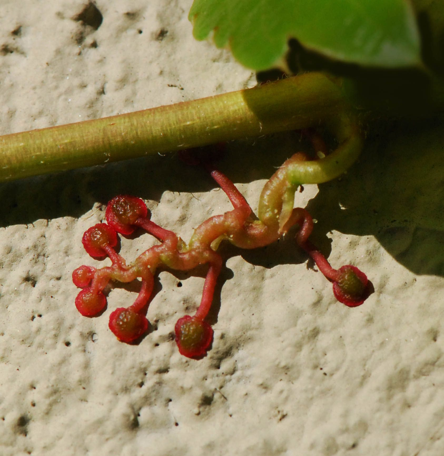 Parthenocissus tricuspidata, vrille avec pelotes adhésives, Paris